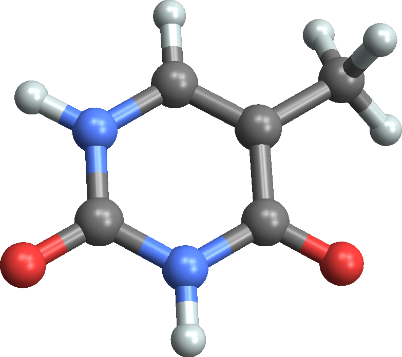 Трехмерная модель молекулы тимина